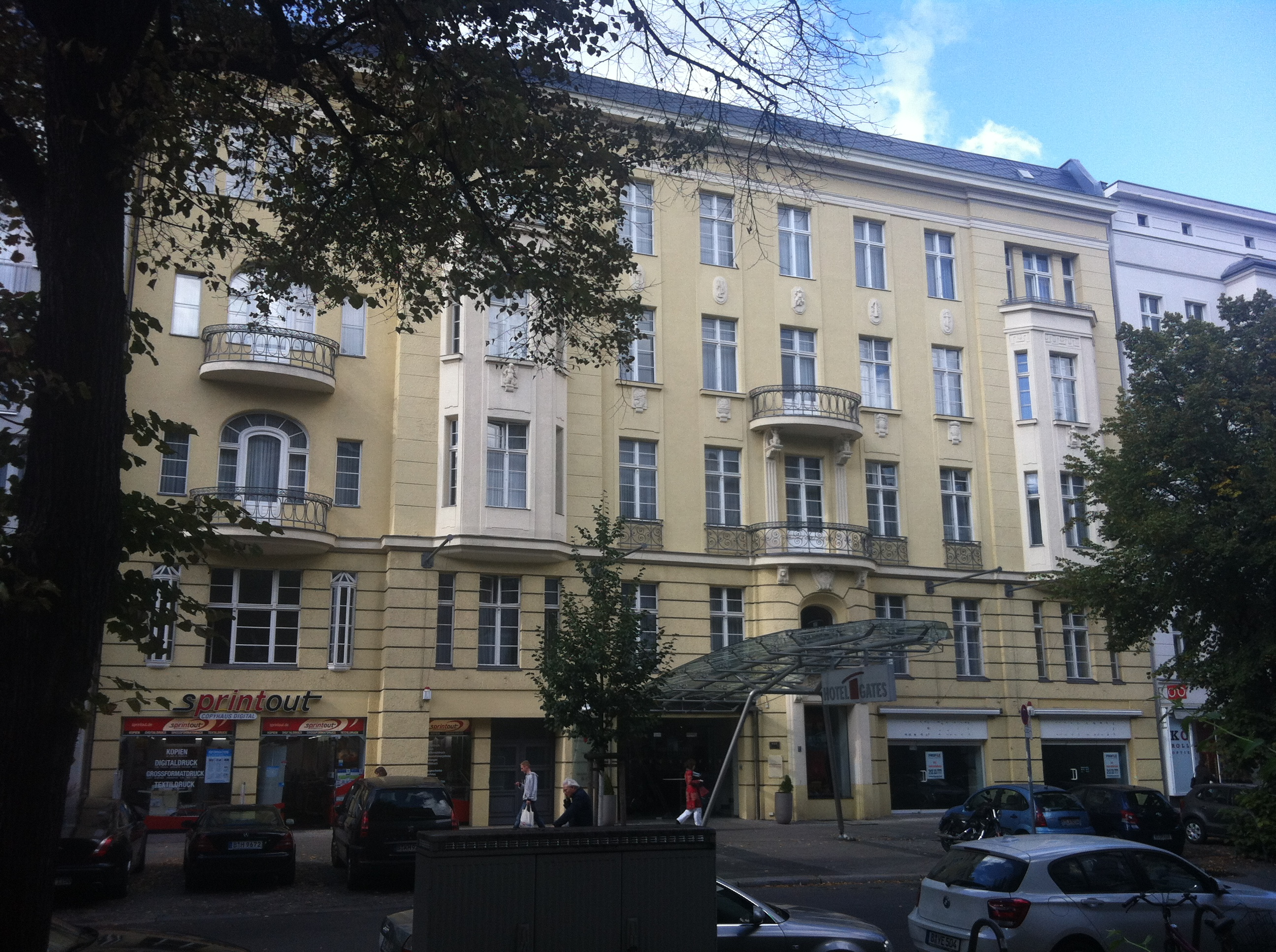 Ursprünglich Mietshaus & Läden, heute Hotel und Läden. 1890–91 von Berthold Röper; Umbau 1911–12 von Paul Imberg.